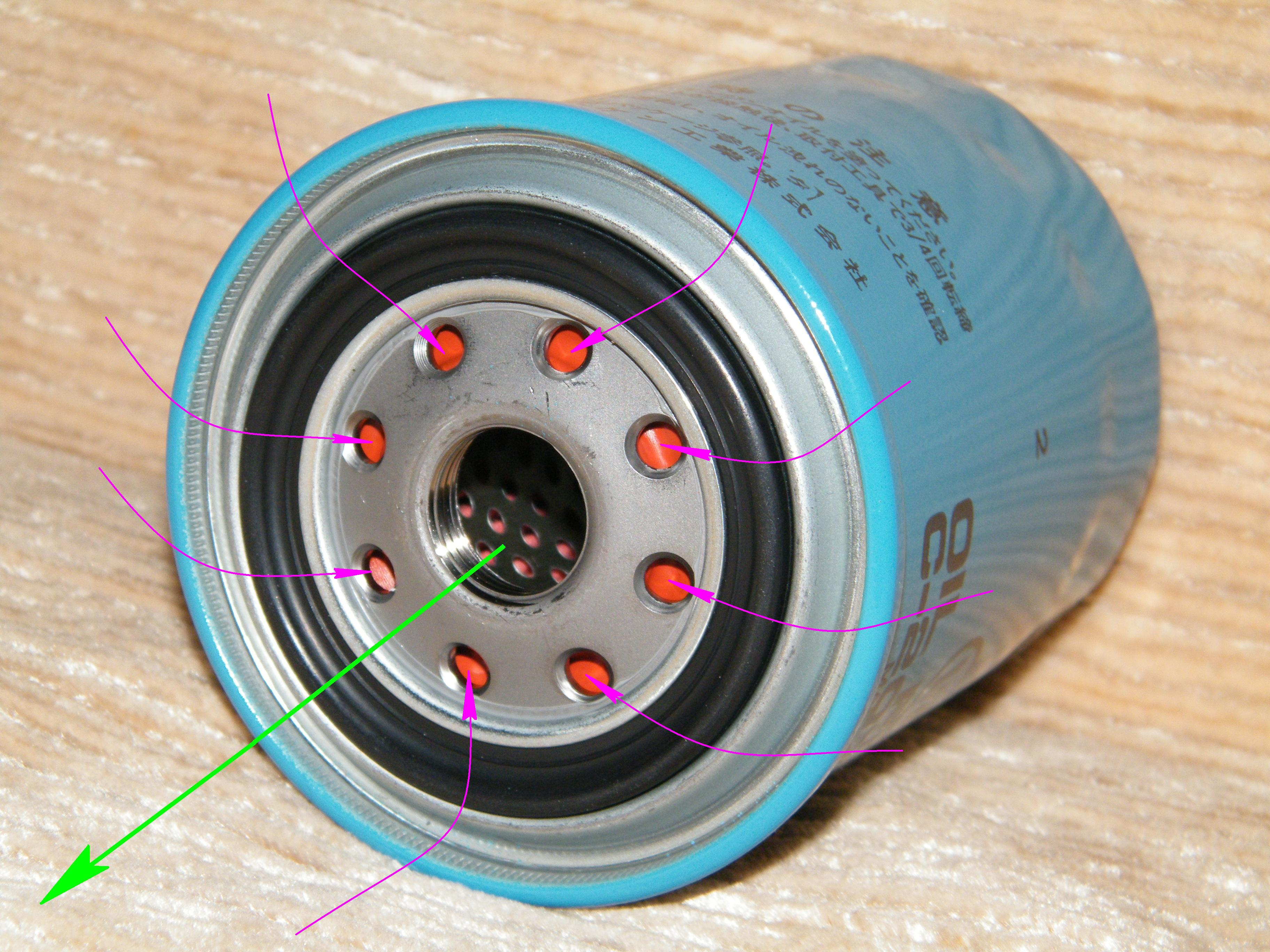 Масляный фильтр Ниссан